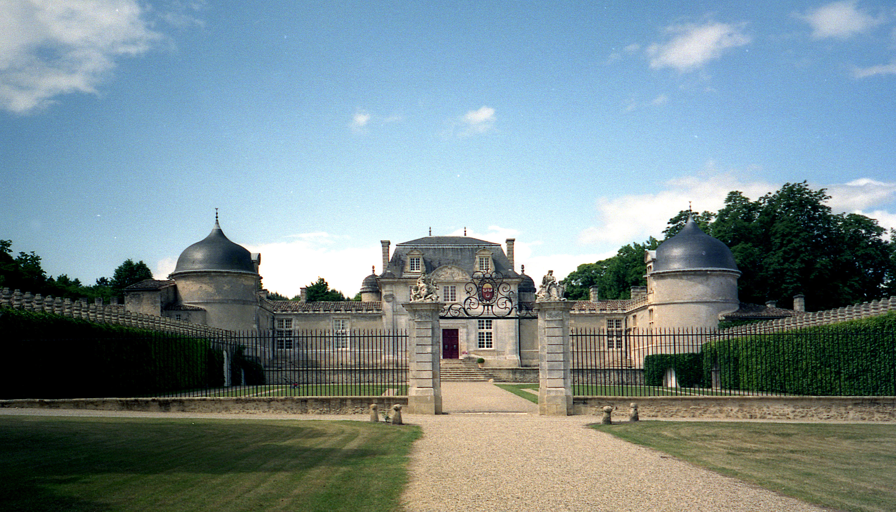 Château de Malle - Bordeaux - Sauternes